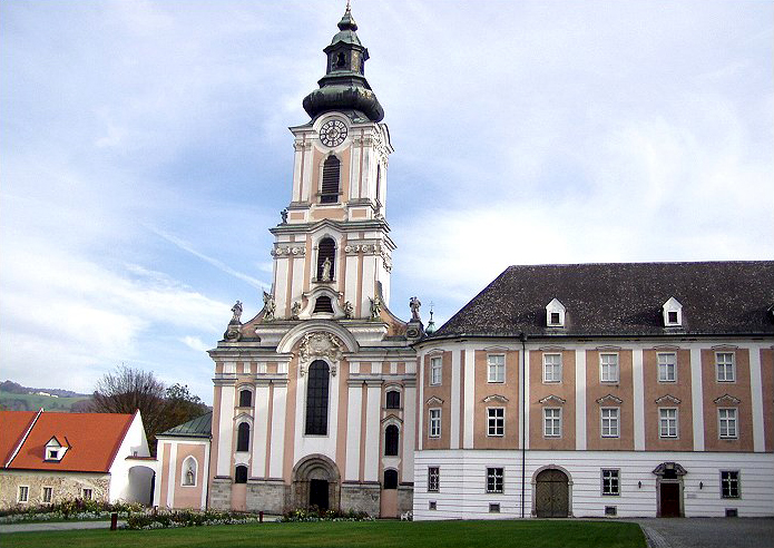 Stiftskirche von Wilhering